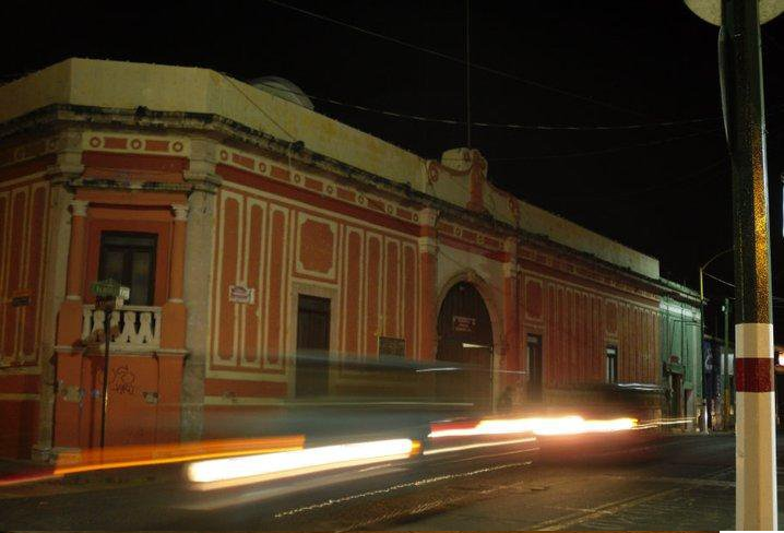 Uriangato desde el centro de la ciudad.